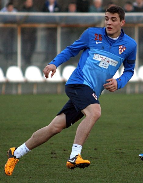 Mateo Kovačić